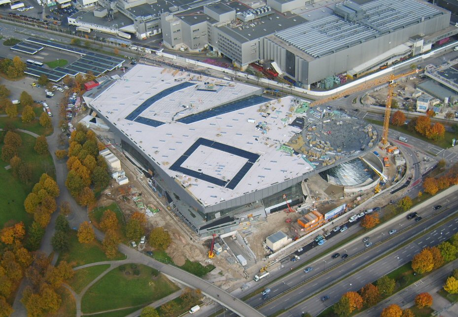 BMW-Welt vom Olympiaturm aus gesehen. Die Aufnahme entstand während der Bauarbeiten im Oktober 2006.